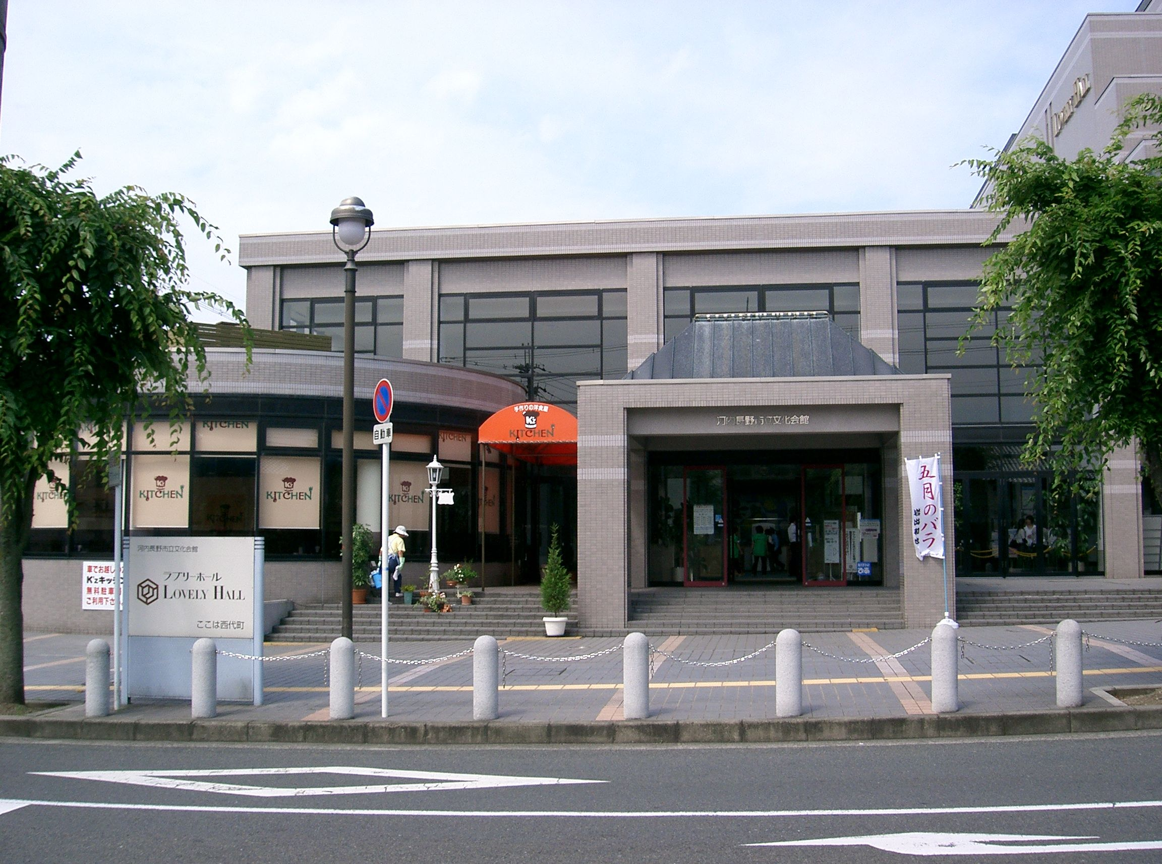 河内長野市立文化会館、ラブリーホール、LovelyHall